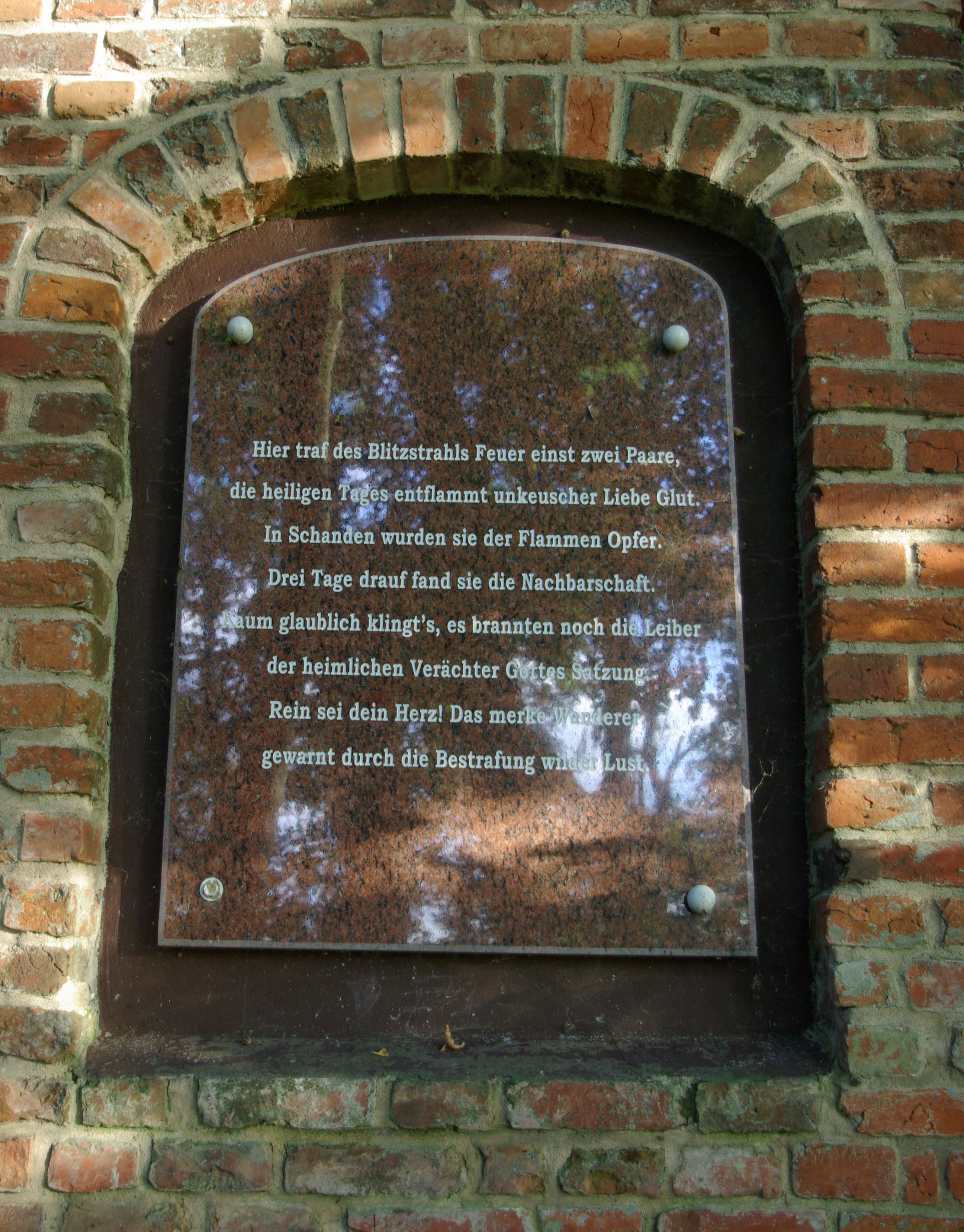 Kal